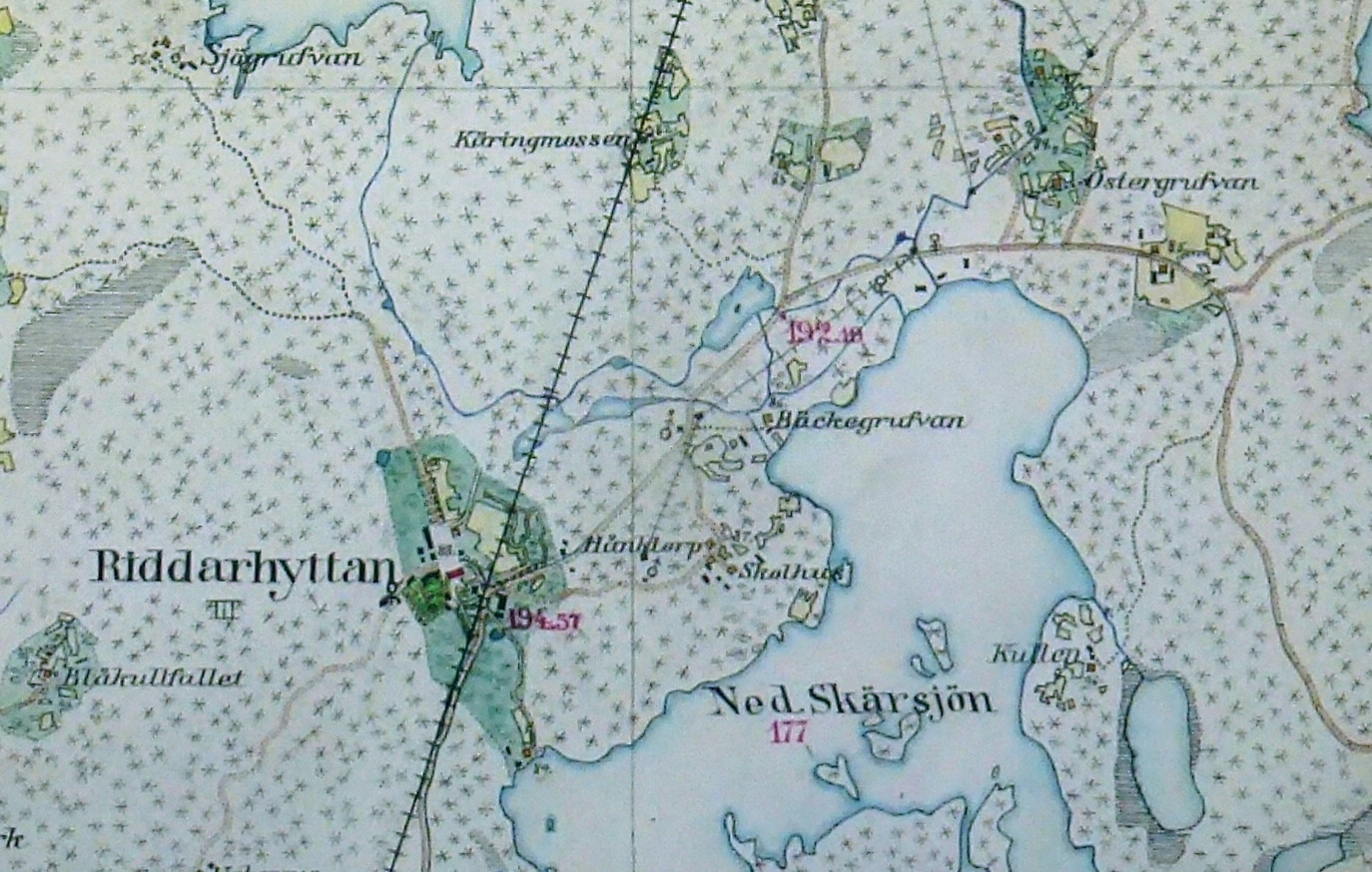 Riddarhyttan med omgivning